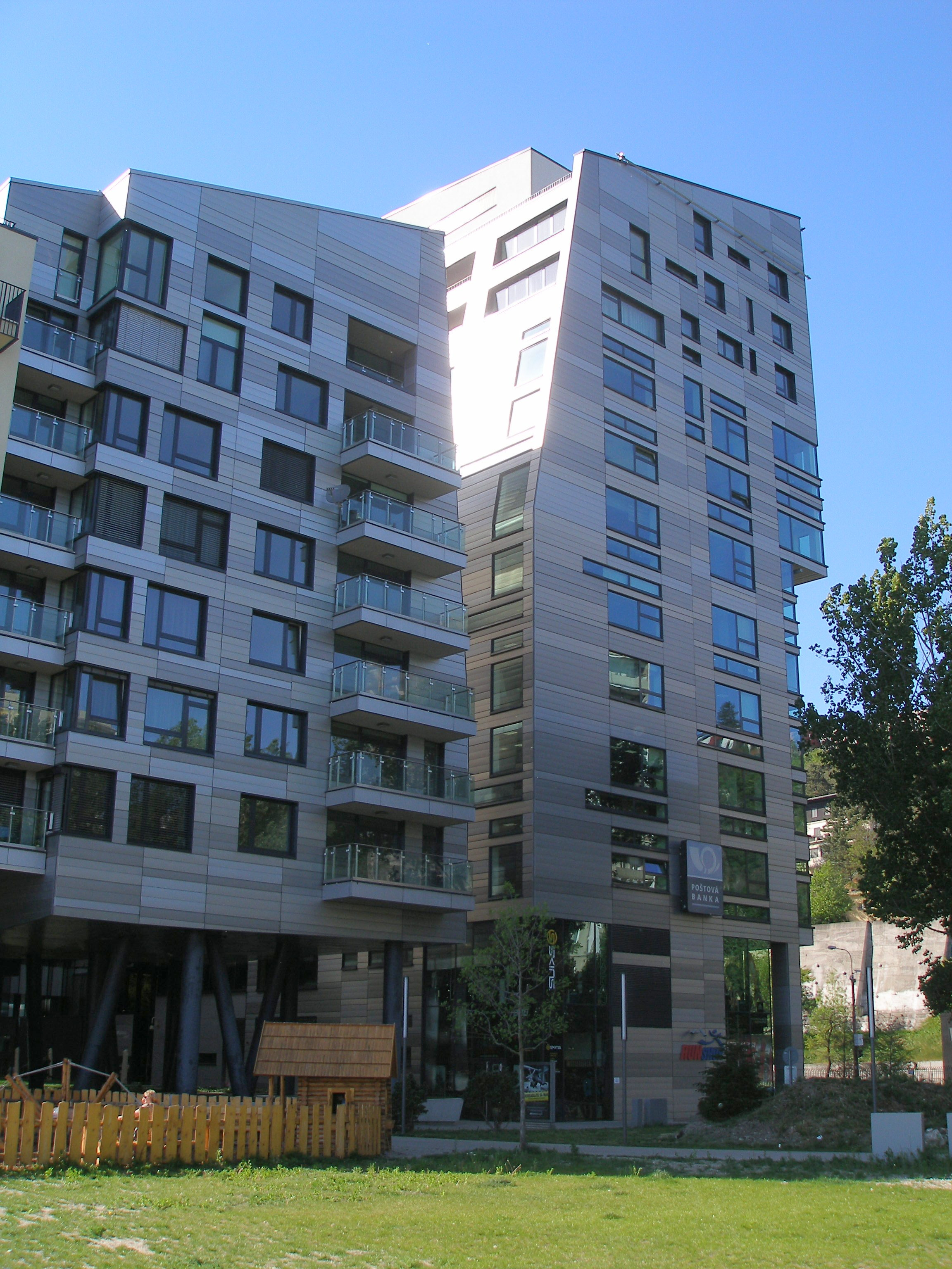 River Park v Bratislave